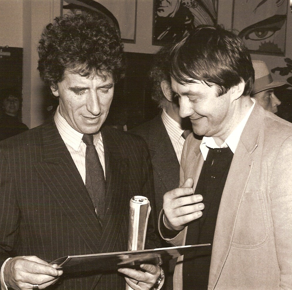 de gauche à droite : Jacques Lang Ministre de la Culture et Alain Meilland directeur du Centre Régional de la Chanson lors du Printemps de Bourges en Avril 1986